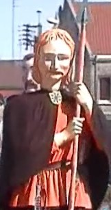 Adalbaud le géant d'Abscon